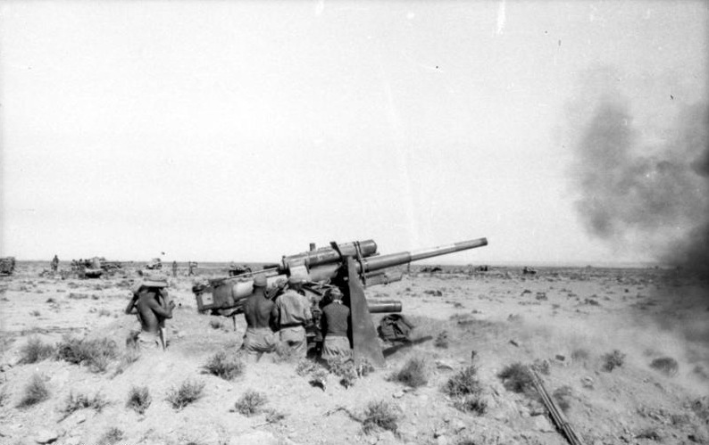 18.6.1942 Rommel gibt 8,8 cm Flak Befehl feindl. Panzerspähwagen, die das feindliche Artilleriefeuer leiten, zu bekämpfen